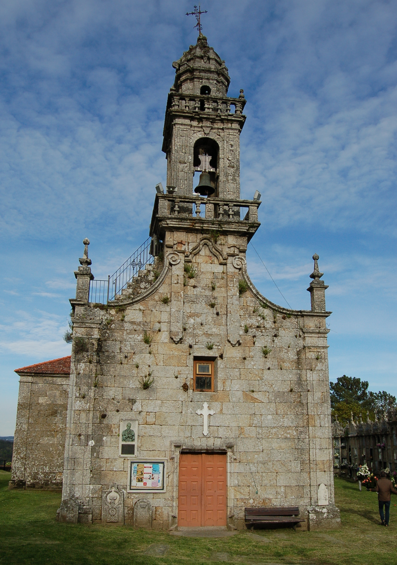 Igrexa parroquial de San Miguel de Albarellos, no concello de Boborás